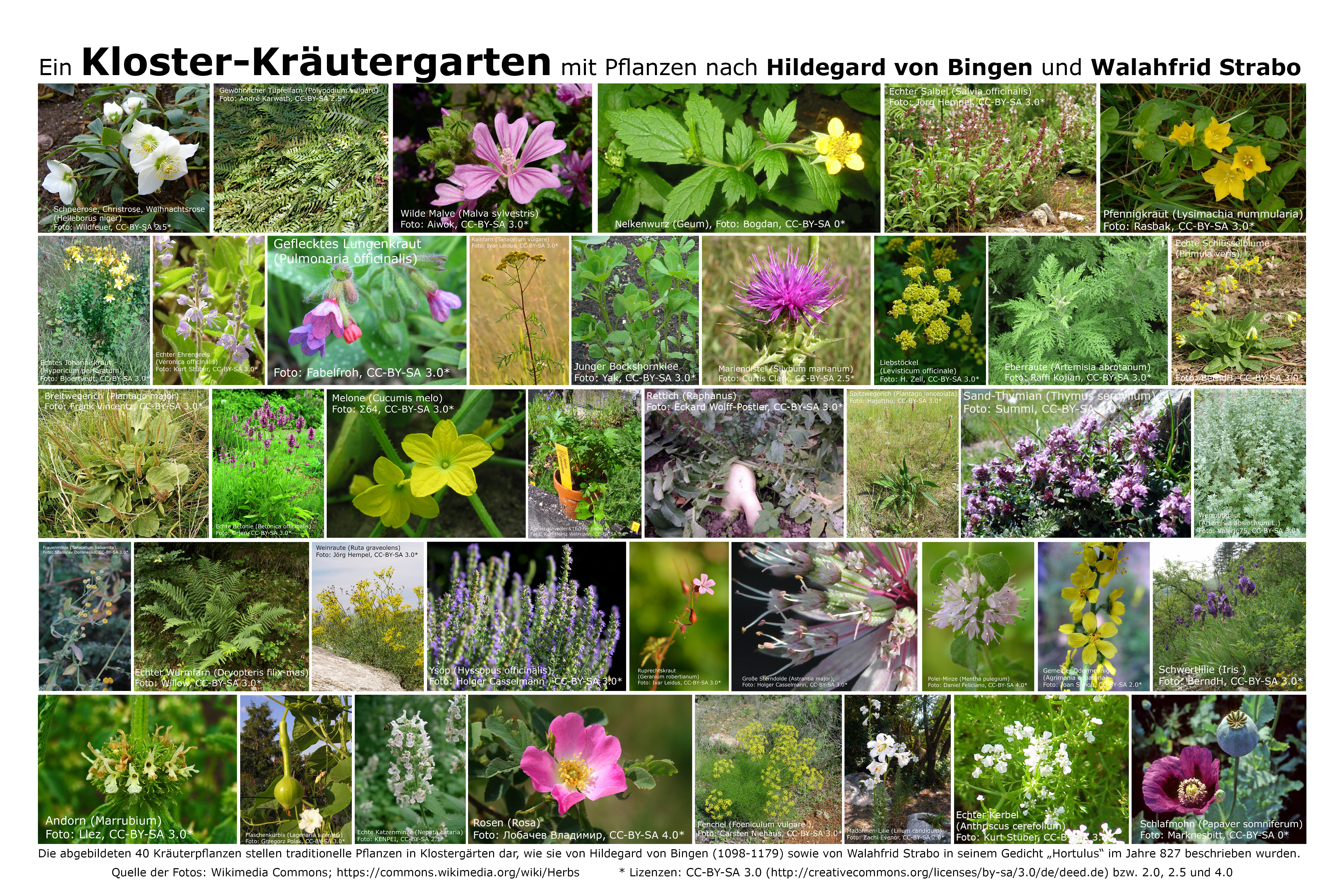 40 Pflanzen eines traditionellen Kloster-Kräutergartens nach Hildegard von Bingen und Walahfrid Strabo